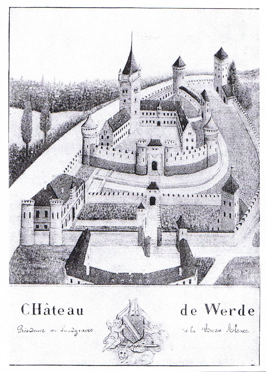 le chateau imaginé par le frère Sitzmann dans son ouvrage de 1912